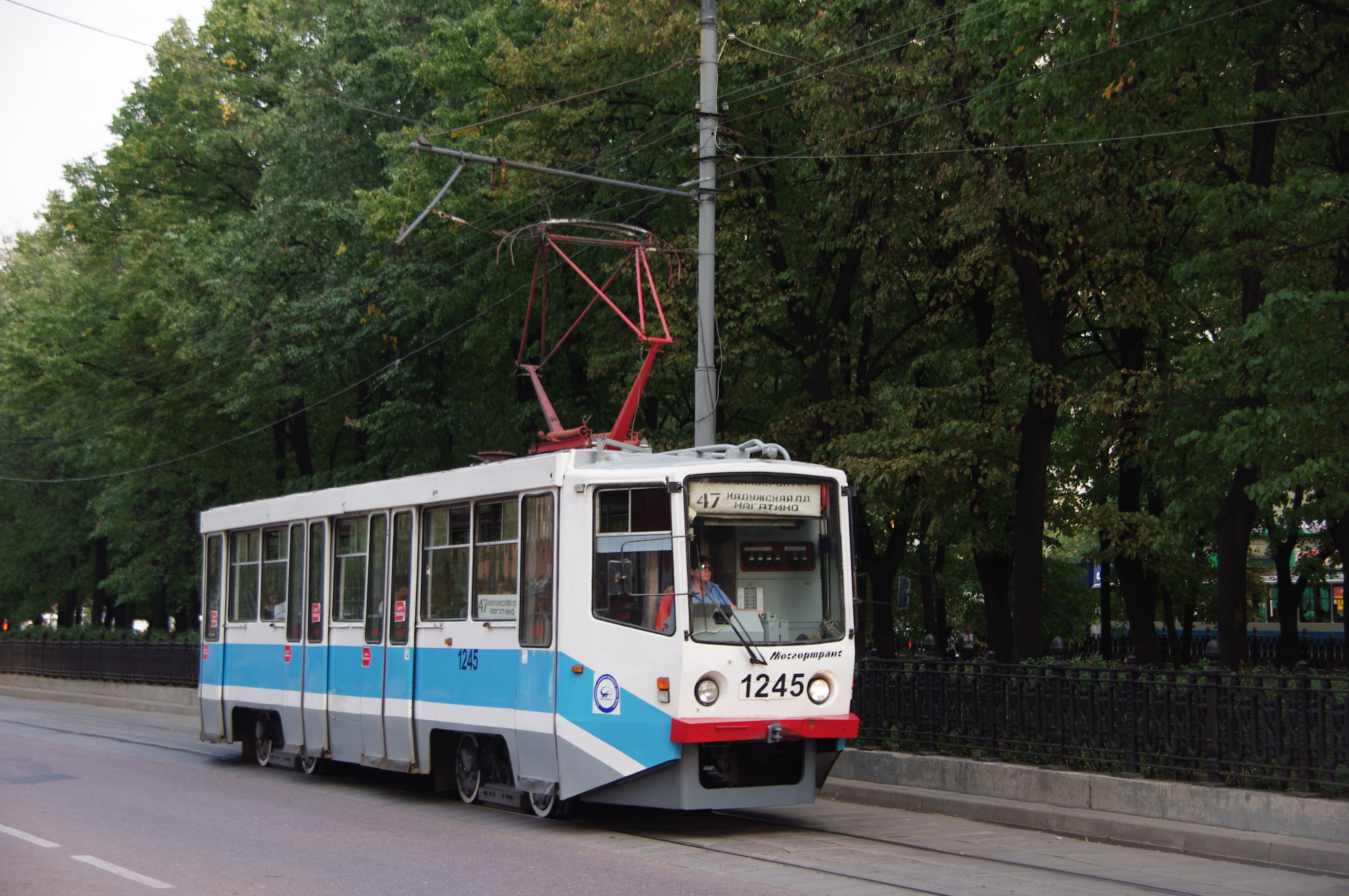 Moscow tram 71-608KM 1245_20110831_005